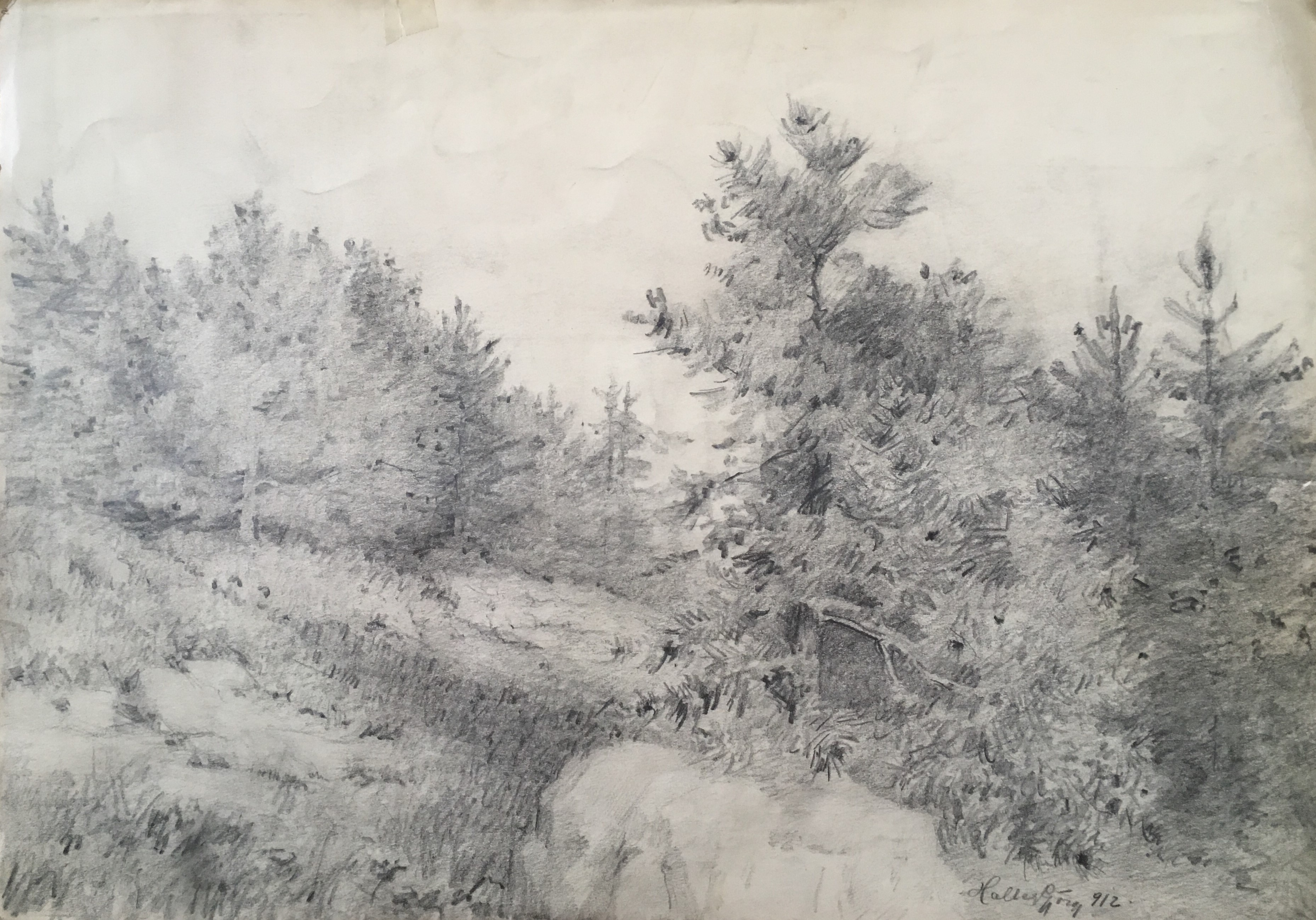 Ceruzarajz